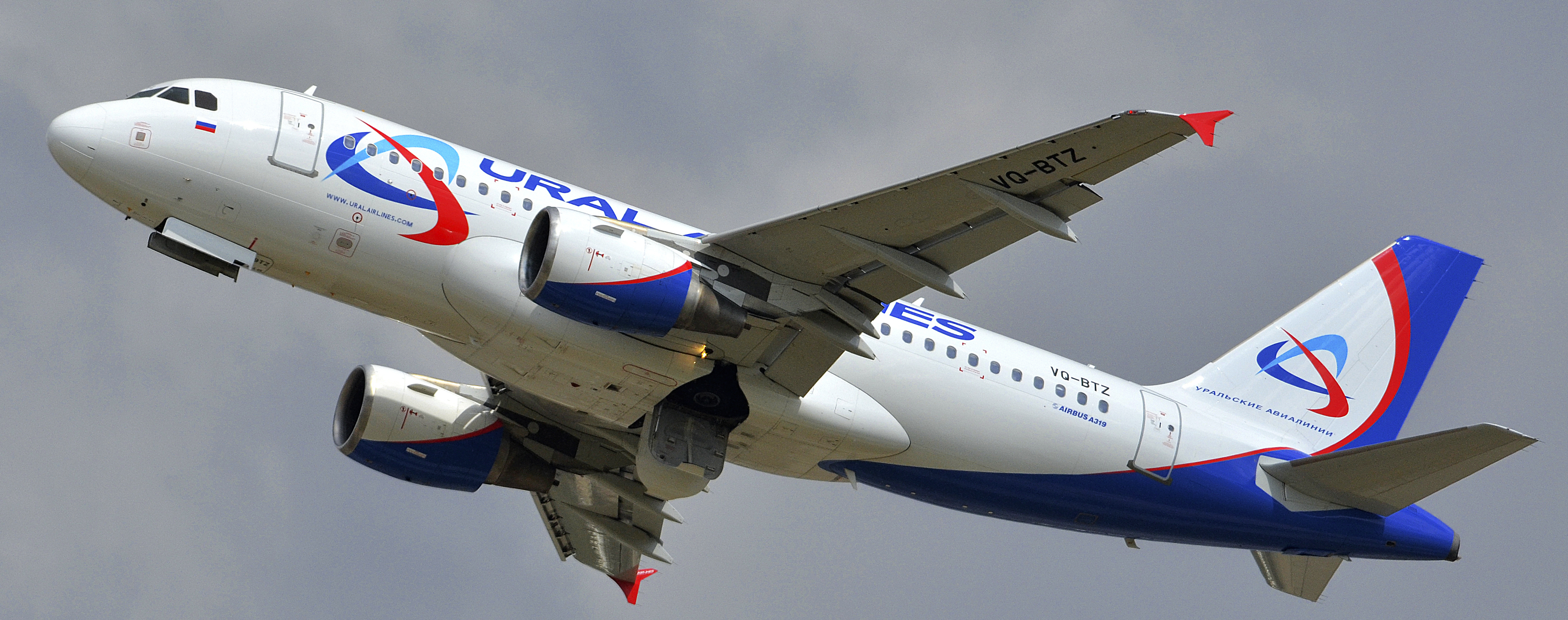 Можно увидеть здесь : You can see here